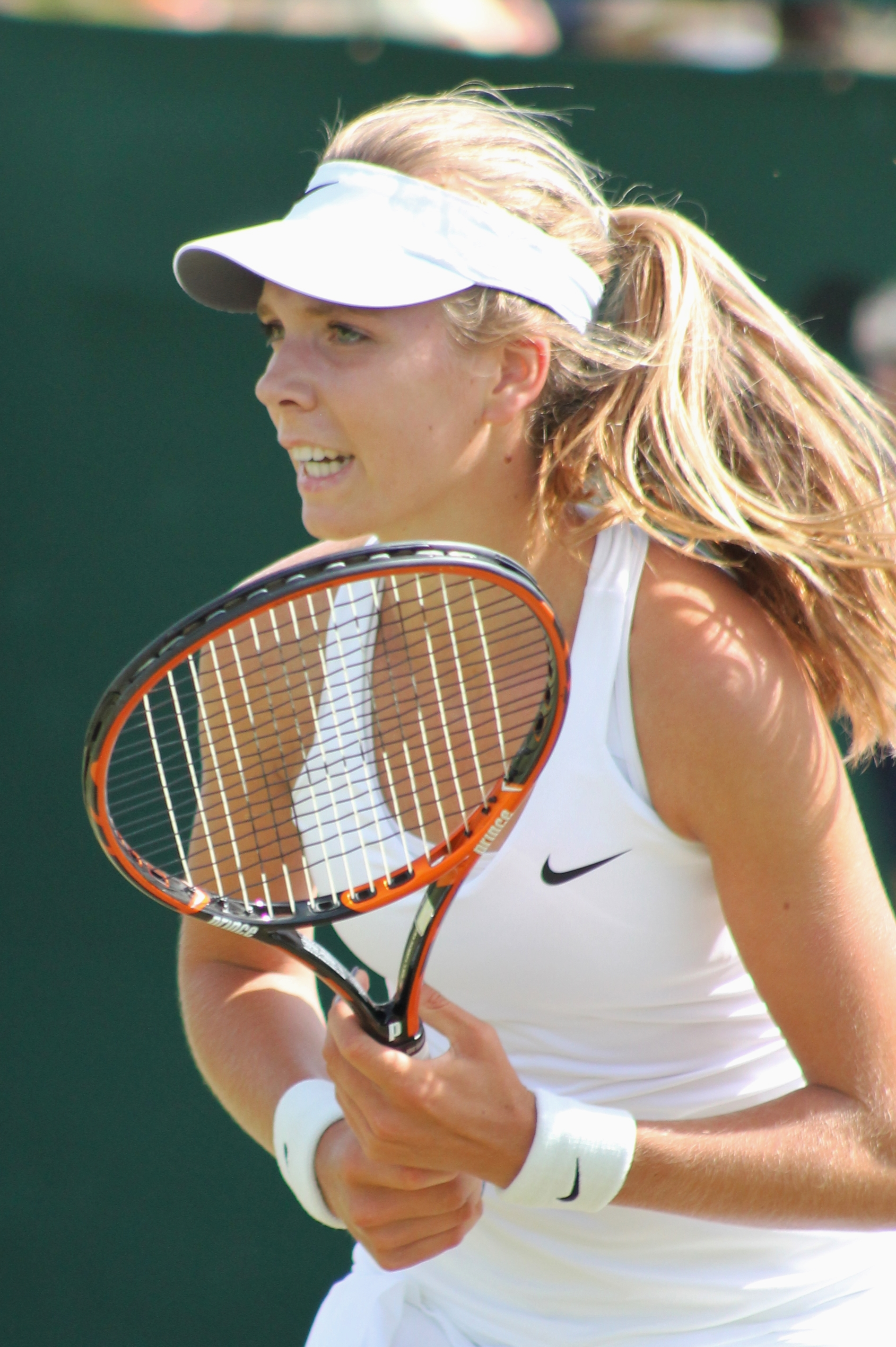 Boulter WMQ14 (6)